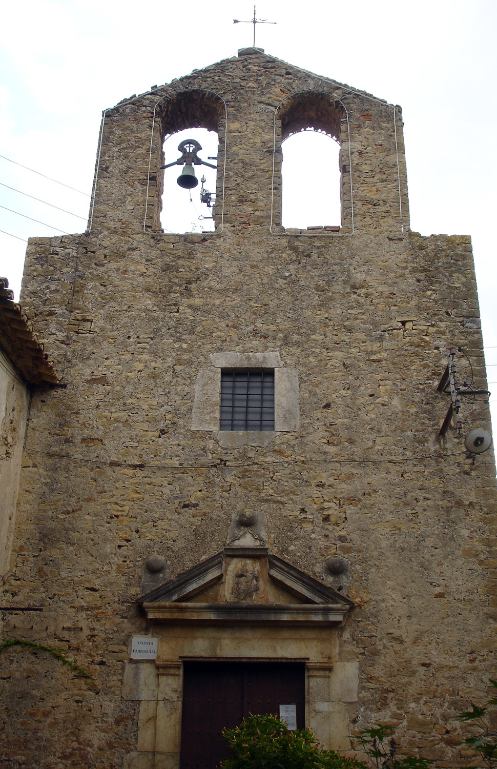 Monestir de Sant Pau de Fontclara (Girona, Catalunya, Espanya) - Façada